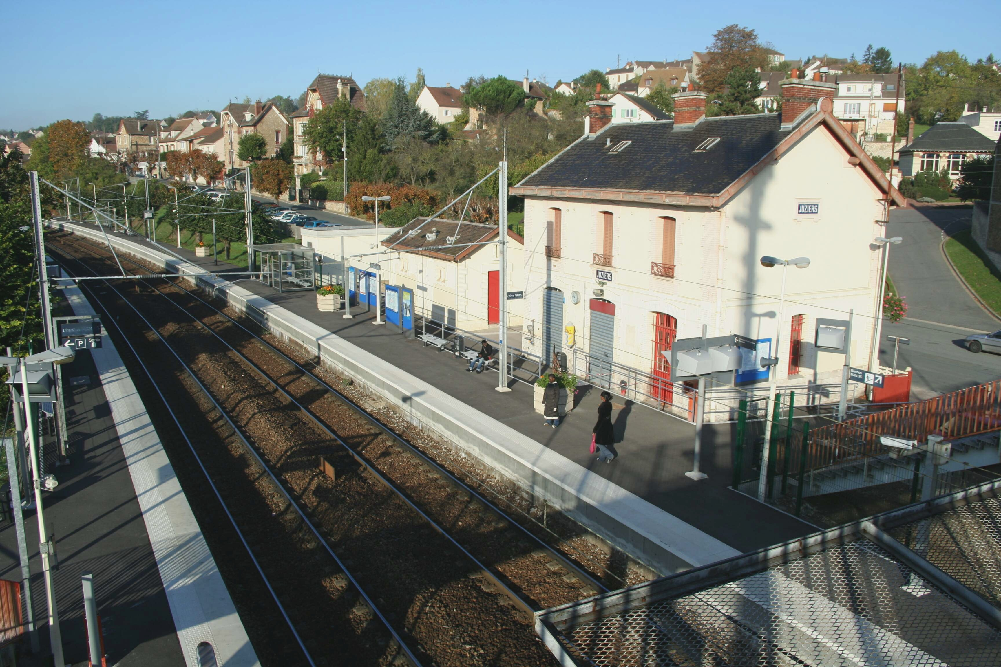 Gare de Juziers - Yvelines (France)